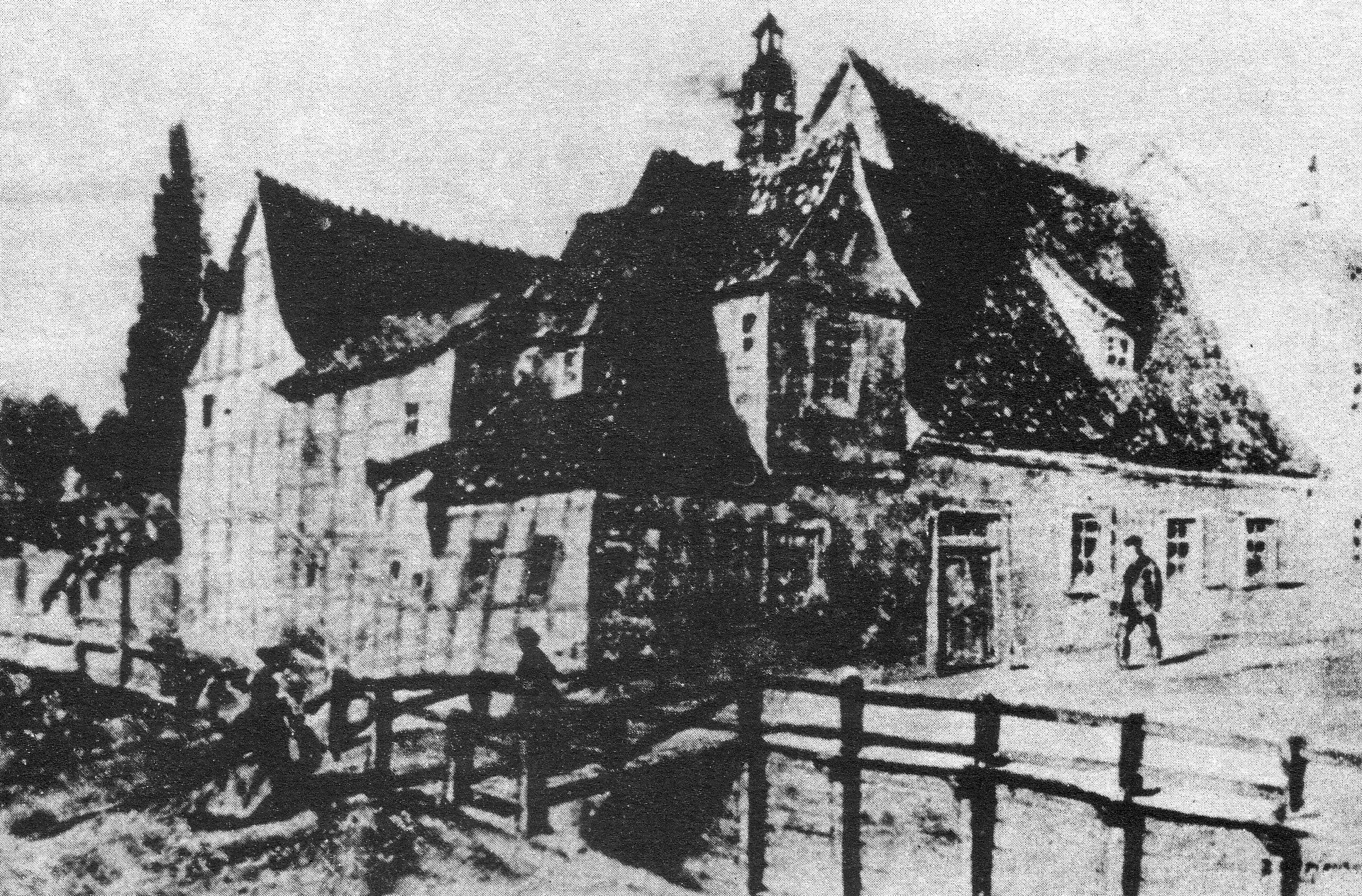 Die Münzstätte Leipzig im 17. Jh.